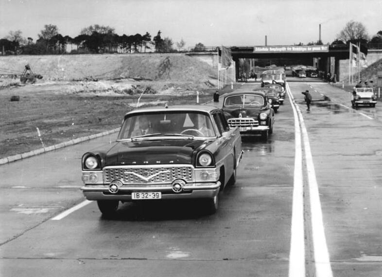 Zentralbild-Quis-Wl-At. 28. 4. 1962 Neue Schnellstraße Adlergestell-Schönefeld eingeweiht. Die Hauptstadt der DDR verfügt seit 28. 4. 1962 über eine neue 4. 13 Kilometer lange Schnellstraße mit Autobahncharakter. Sie verbindet das Grünauer Adlergestell mit dem südlichen Verkehrsknotenpunkt Schönefeld, wo sich auch der Zentralflughafen befindet, und mündet in die Fernverkehrsstraße 119 ein. Die neue Betonschallbahn ist 15 Meter breit und mit einem weissen Mittelstreifen versehen, der beide Fahrbahnseiten trennt. Oberbürgermeister Friedrich Ebert-Mitglied des Politbüros des ZK der SED-gab um 10. 50 Uhr in Anwesenheit des Ministern für Verkehrswesen, Erwin Kramer, des Ministers für Bauwesen, Ernst Scholz, und anderen Persönlichkeiten die neue Schnellstraße für den Verkehr frei. UBz: Die ersten Autos befahren die neue Schnellstraße.